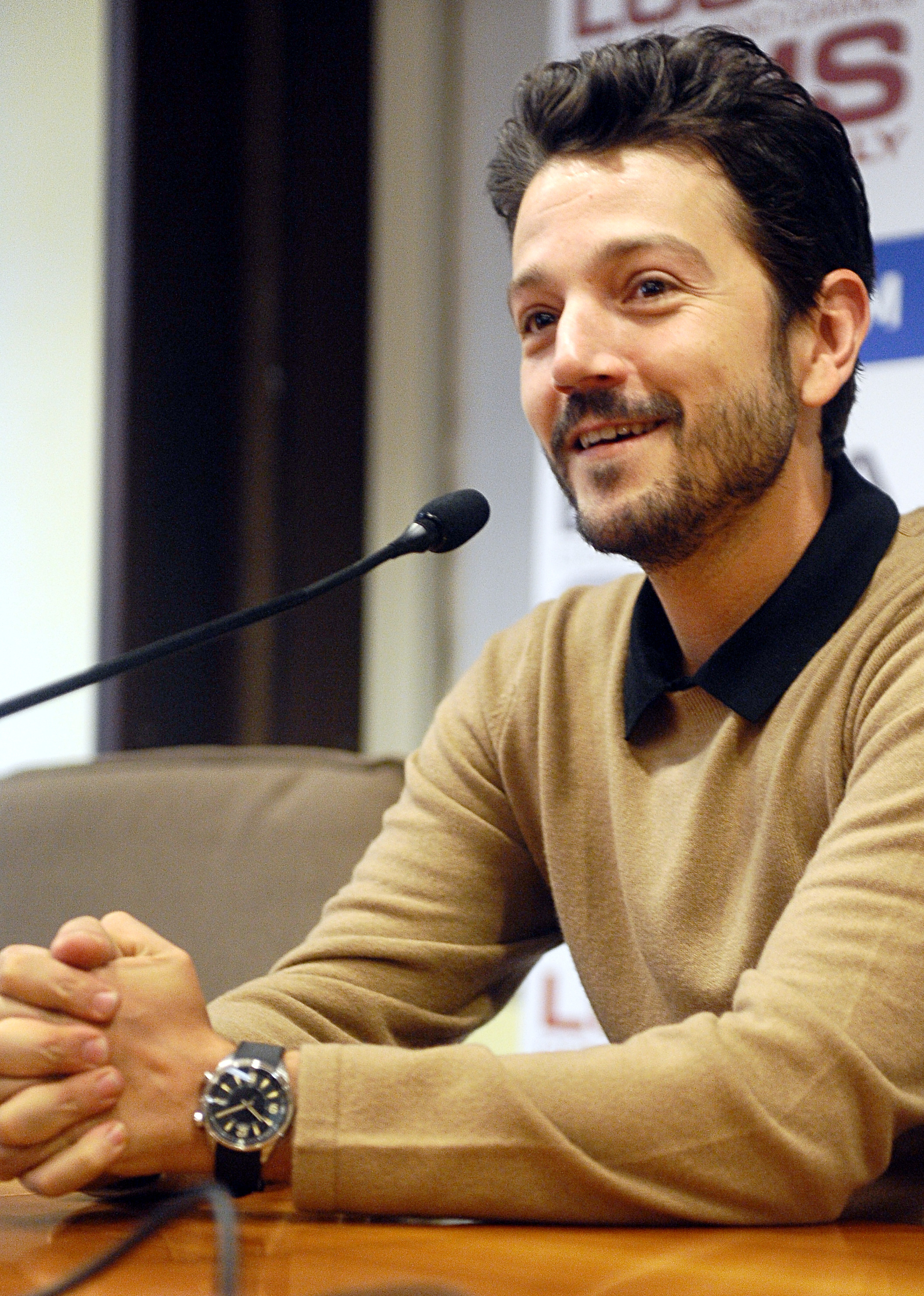 Diego Luna a Lucca Comics & Games. Conferenza stampa in Camera di Commercio.